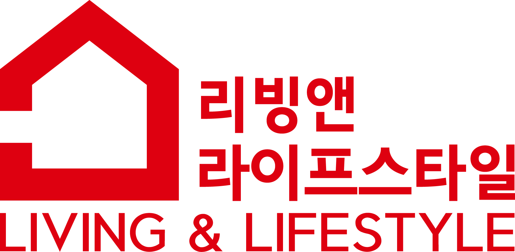 리빙앤라이프스타일 로고 입니다.